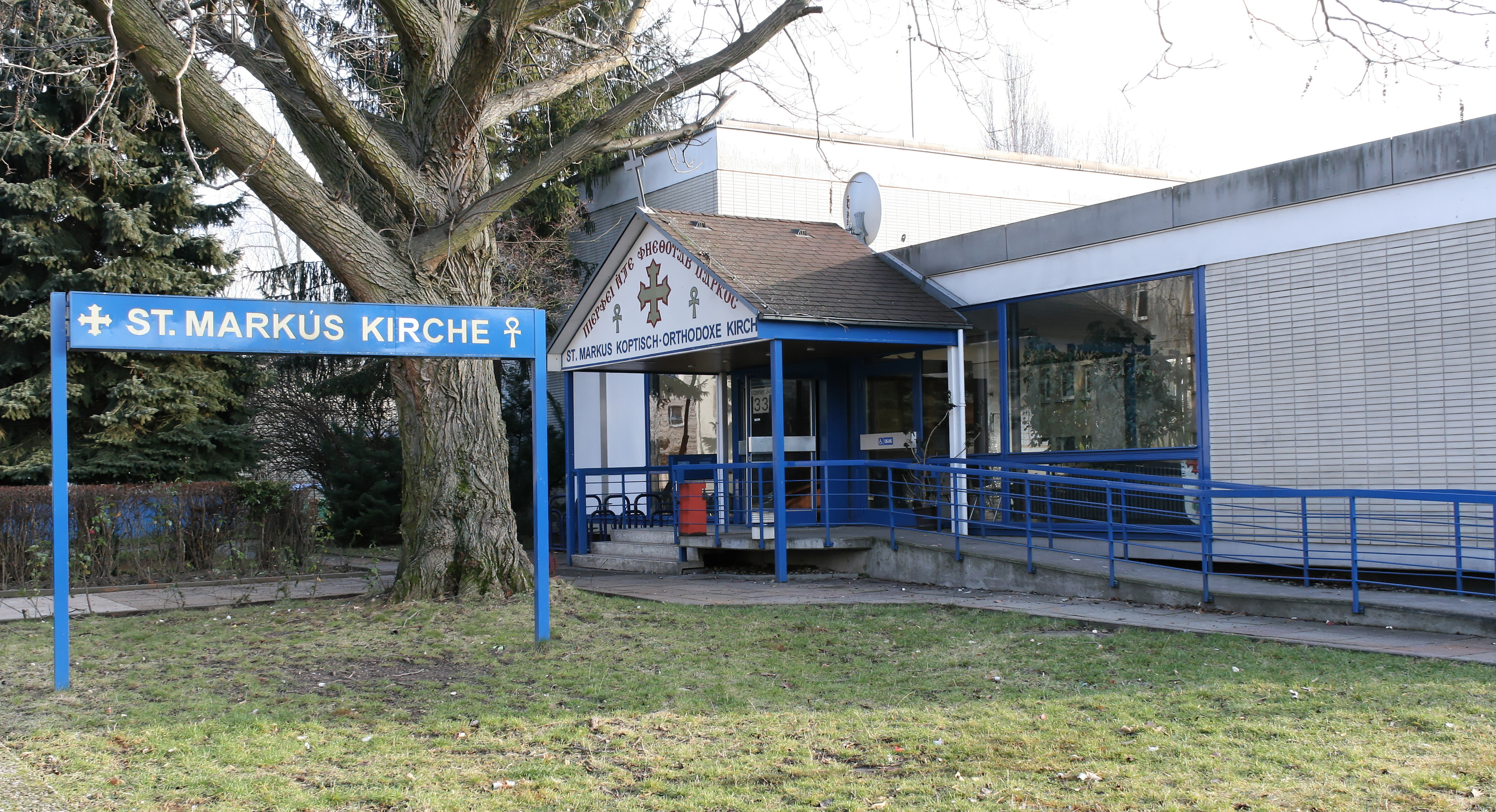 Koptisch-Orthodoxes Gemeindezentrum in Frankfurt am Main-Bockenheim, Lötzener Straße 33